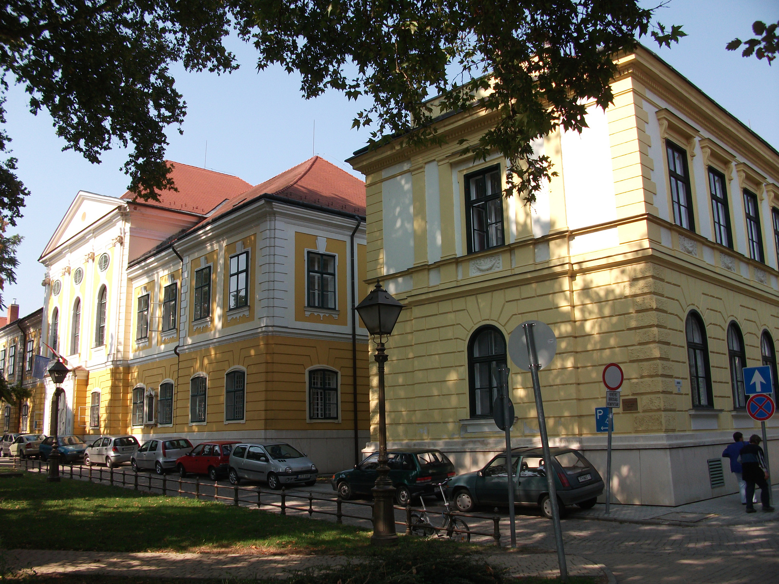 Régi vármegyeháza (Zala Megyei Bíróság) (Zalaegerszeg, Várkör utca 2.) This is a photo of a monument in Hungary. Identifier: 11072